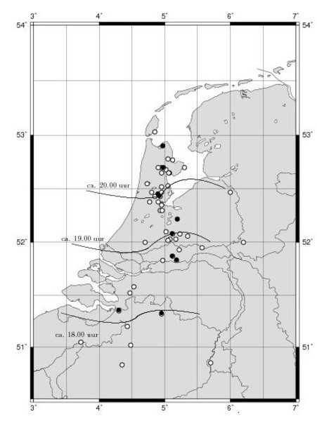 Kaart van het KNMI met de getroffen plaatsen in Belgie en Nederland waar schade werd gemeld nav de zomerstorm van 1 augustus 1674. Die dag was een uitzonderlijke weersituatie ontstaan die in Noordwest-Europa grote schade aanrichtte door onder meer zware onweersbuien, hagel en windstoten. De storm trok vanuit het huidige Noord-Frankrijk over België en Nederland tot aan Noord-Duitsland. Het resulteerde in tal van ingestorte gebouwen, vele slachtoffers en een ontwricht maatschappelijk leven. In de stad Utrecht ontstond de grootste schade. Daar richtte een tornado een enorme ravage aan. De auteurs melden bij de kaart: "Plaatsen waar schade gemeld is op 1 augustus 1674. De meest extreme schade, zoals ingestorte kerken (Hellouw, Asperen, Utrecht, Hippolytushoef, Den Ilp, Hoogwoude, Zandvliet) of op grote schaal verwoeste huizen (Turnhout, Zandvliet, Hilversum en Landsmeer), is gemeld in de zwart gekleurde plaatsen. Een voorzichtige reconstructie van de positie van het front is ingetekend."